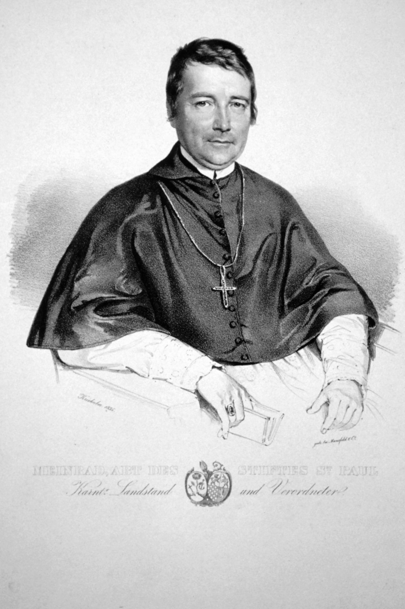 Meinrad Amann (1785-1839), Abt des Benediltinerstiftes St. Paul im Lavanttal. Lithographie von Josef Kriehuber, 1835